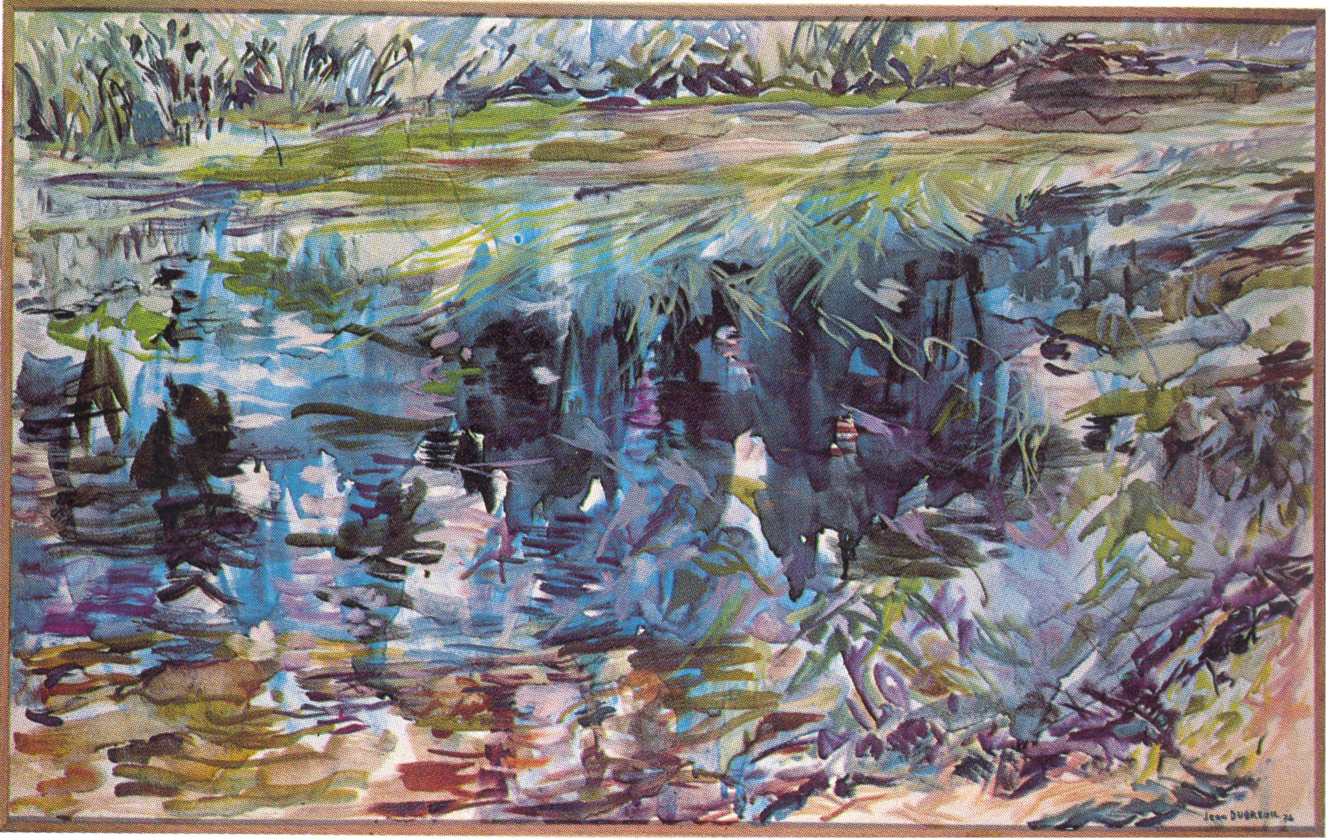 Ruisseau